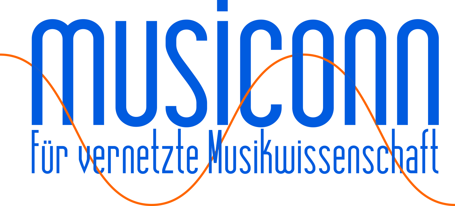 offizielles Logo von musiconn